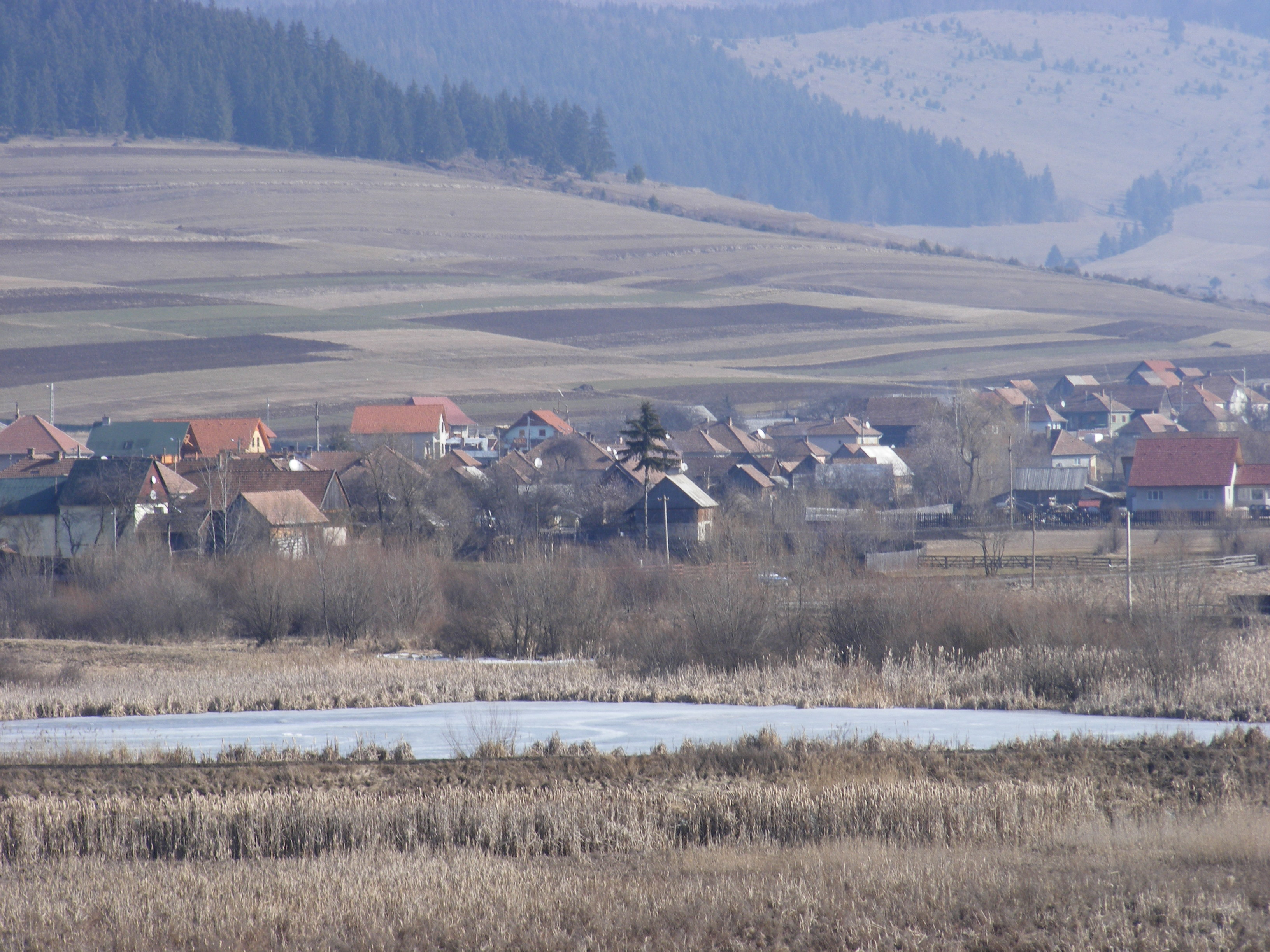 Fitód, Székely land